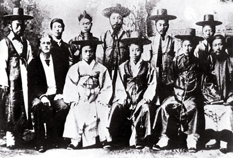 1883년 미국에 파견된 조선사절단